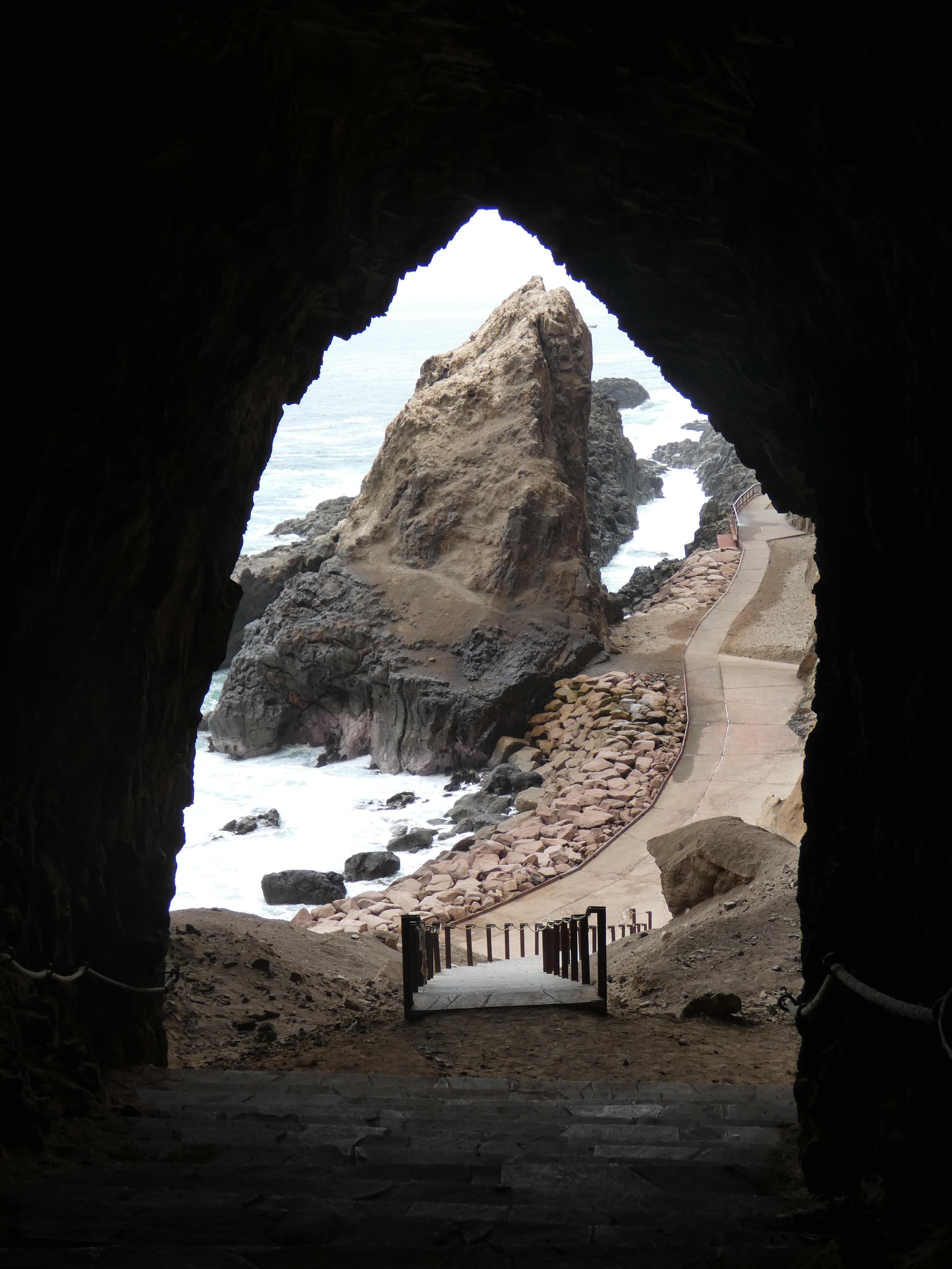 Vista desde la escalera en el interior de una de las cuevas